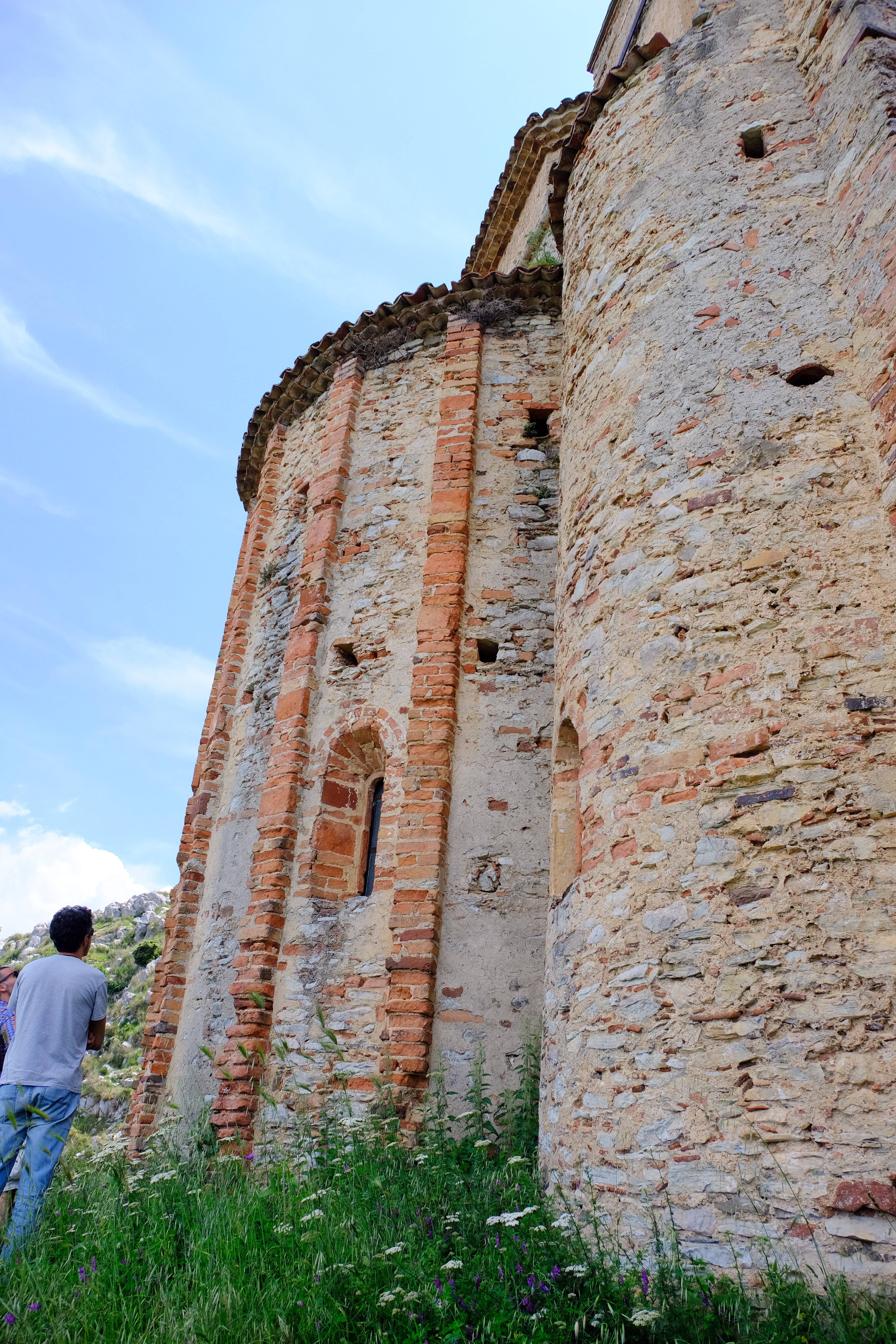 Convento di San Filippo di Fragalà